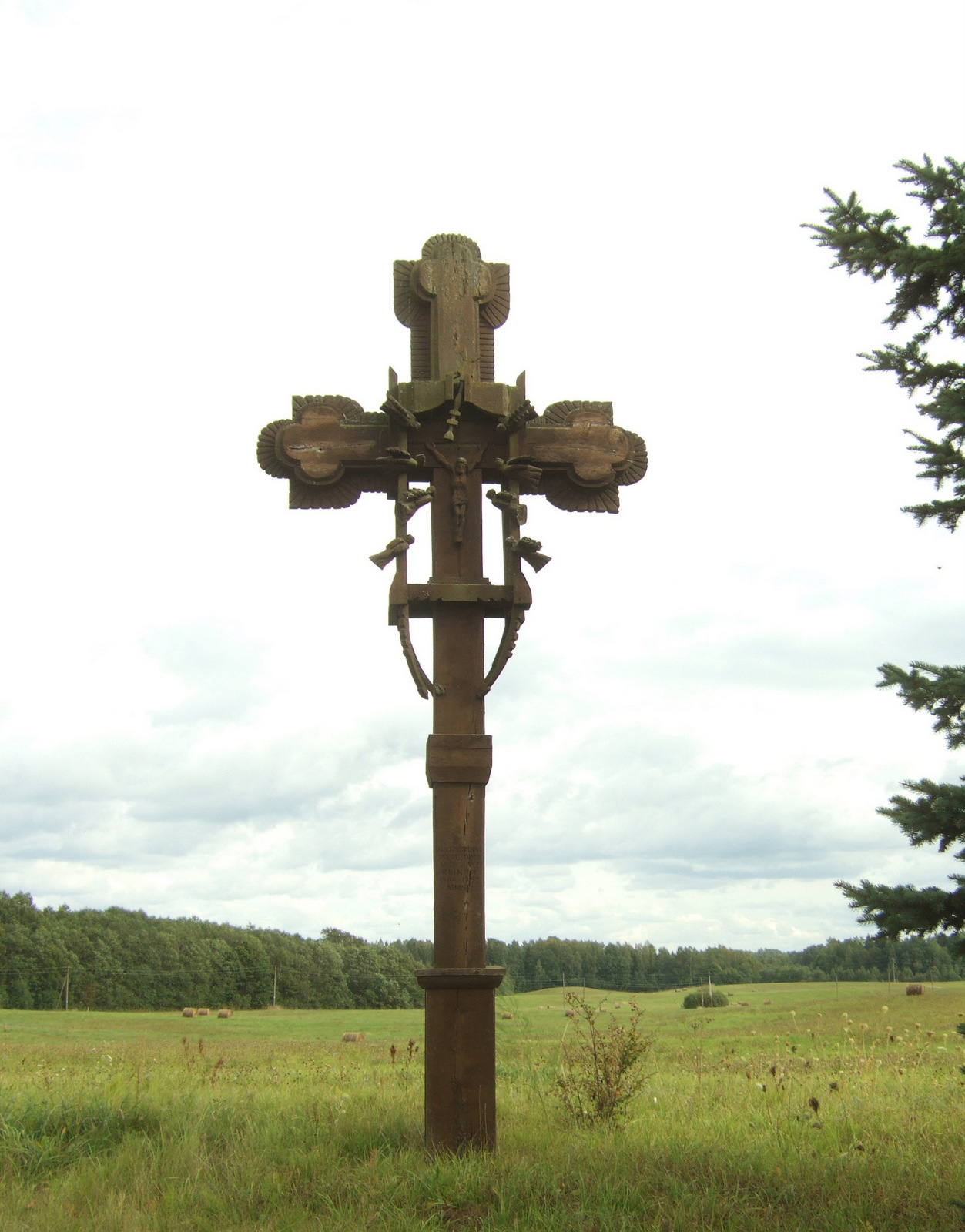 Kryžius kun. M. Reiniui prie Madagaskaro kaimo.